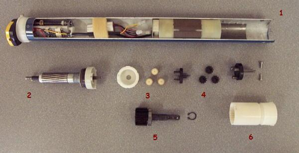 Réducteur démonté. Actionneur de volets roulants ou stores automatiques (SOMFY). corps support de l'ensemble (écorché) rotor du moteur électrique (arbre d'entrée) avec pignon taillé sur l'arbre éléments du 1er étage de réduction (planétaire extérieur, satellites et porte-satellites) éléments du 2ème étage de réduction (satellites et porte-satellites) 3ème étage assemblé (arbre de sortie) Couronne (planétaire commun aux deux derniers étages) 3 étages pour une réduction de 180 environ. Diamètre de l'ensemble 50 mm. cliché personnel. Illustration de cours de sciences de l'ingénieur.